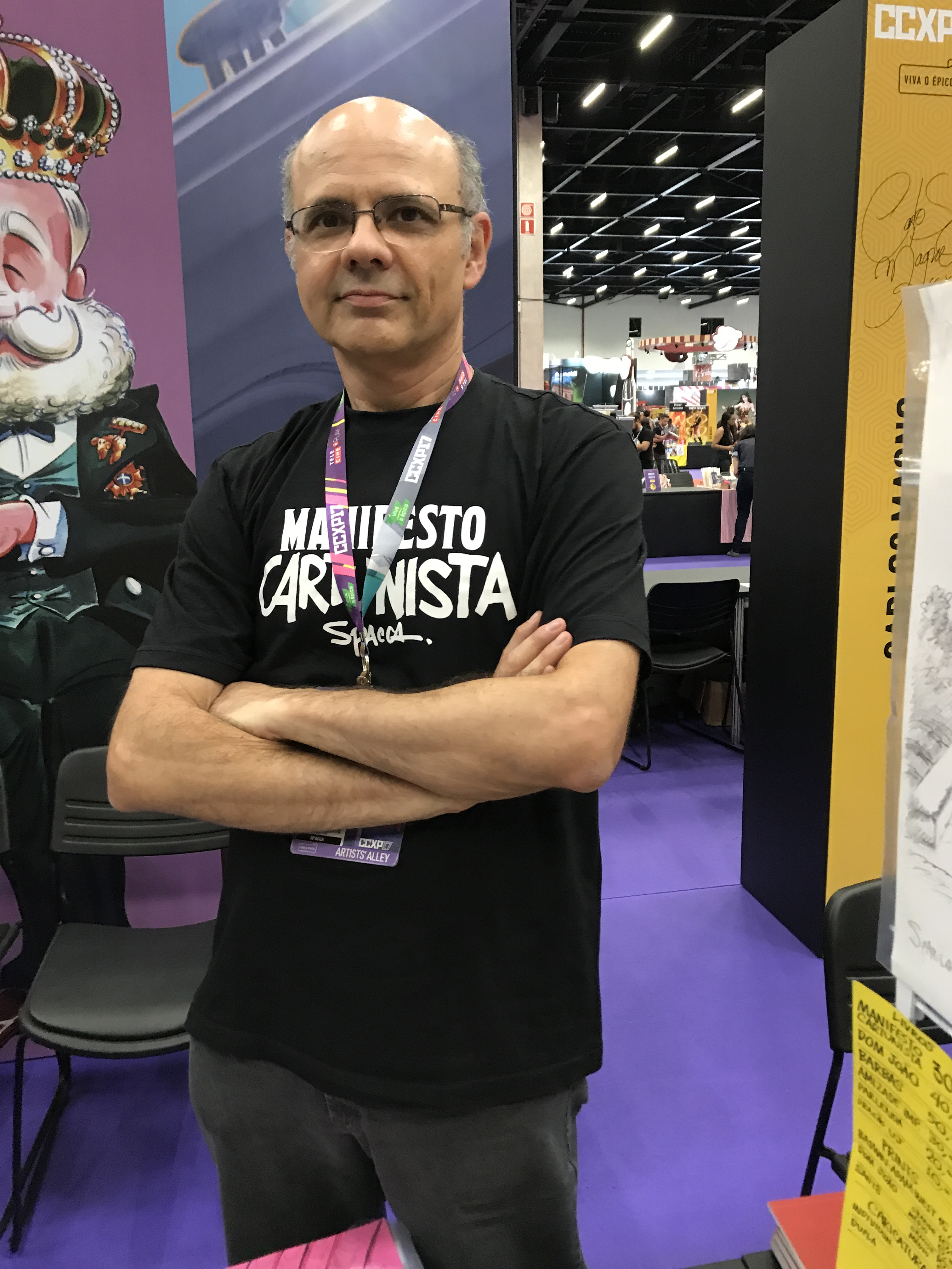 Artista Spacca na edição de 2017 da Comic Con Experience